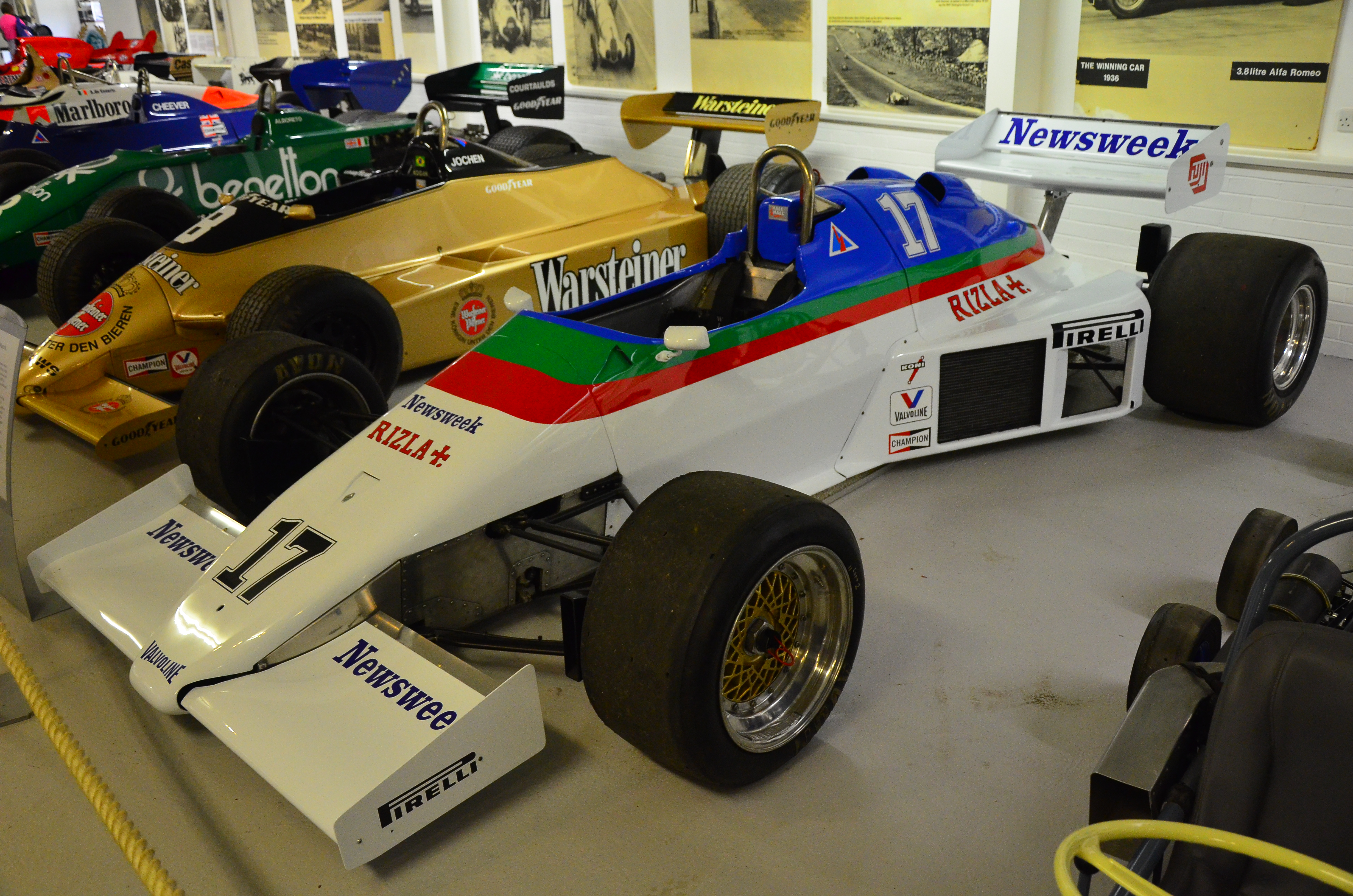 RAM 01 (championnat 1983) ex Eliseo Salazar.